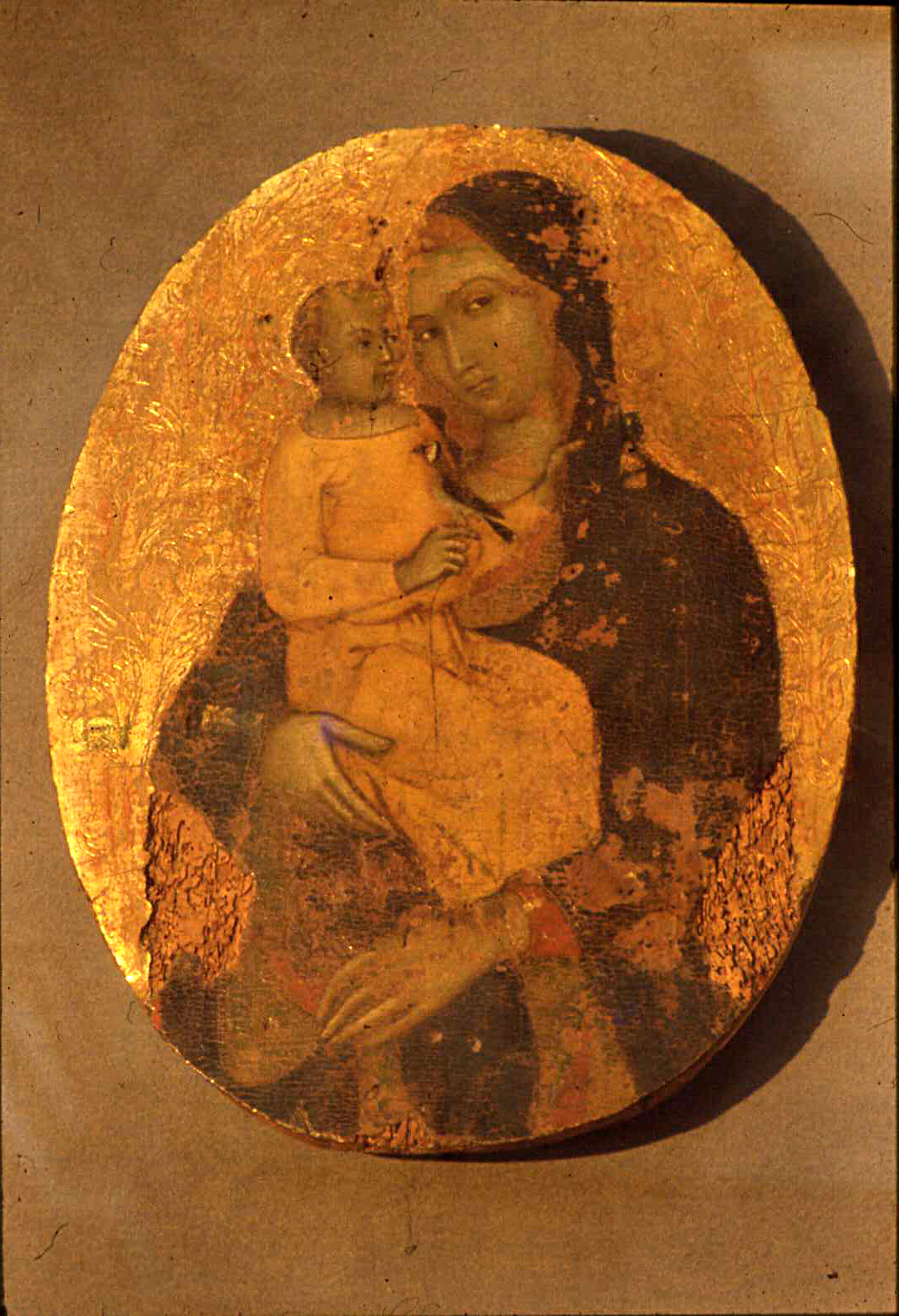 Madonna del miele. tempera su tela incollata su tavola ovale. Chiesa dei Santi Paolo e Bartolomeo, Alcamo